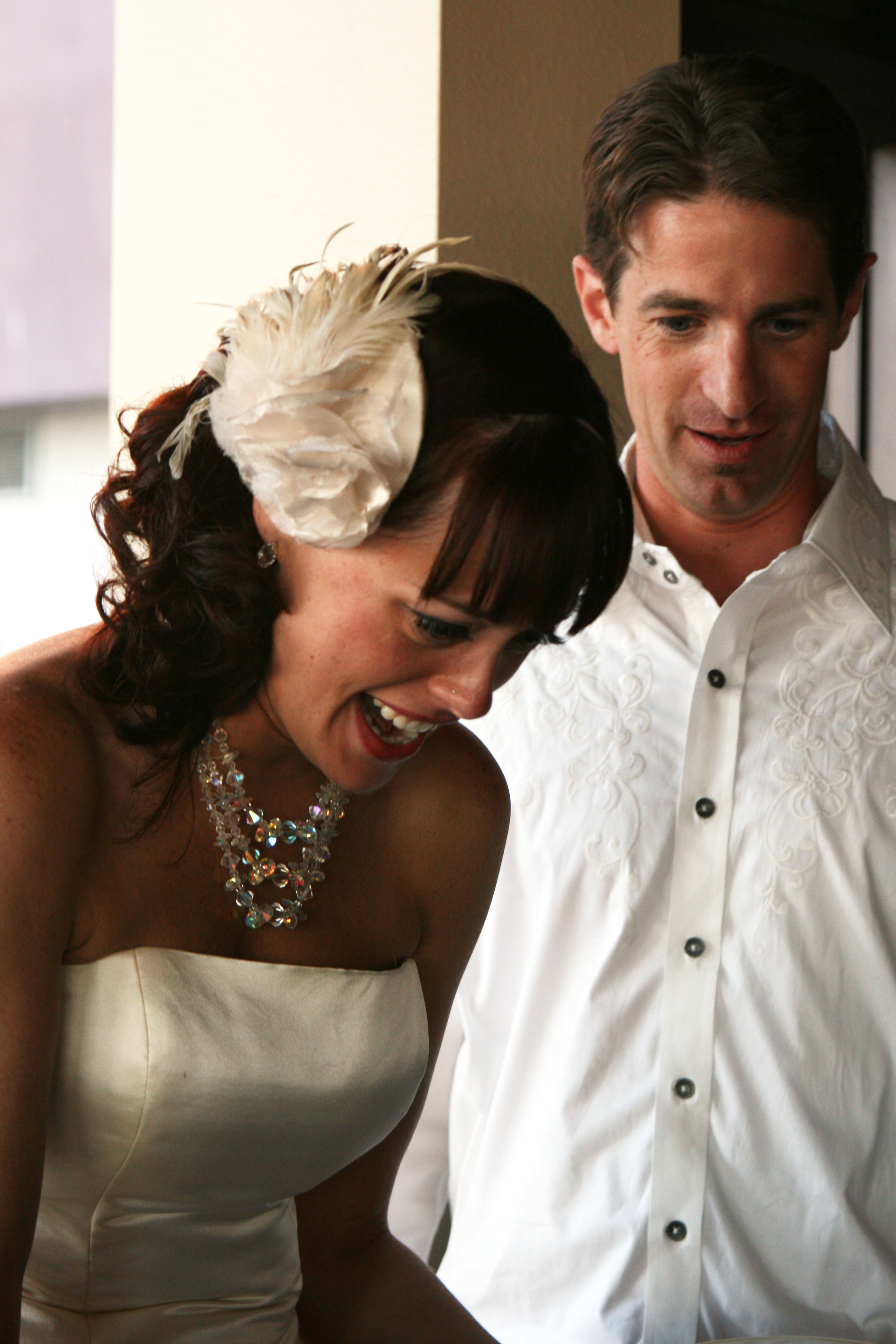 Delight